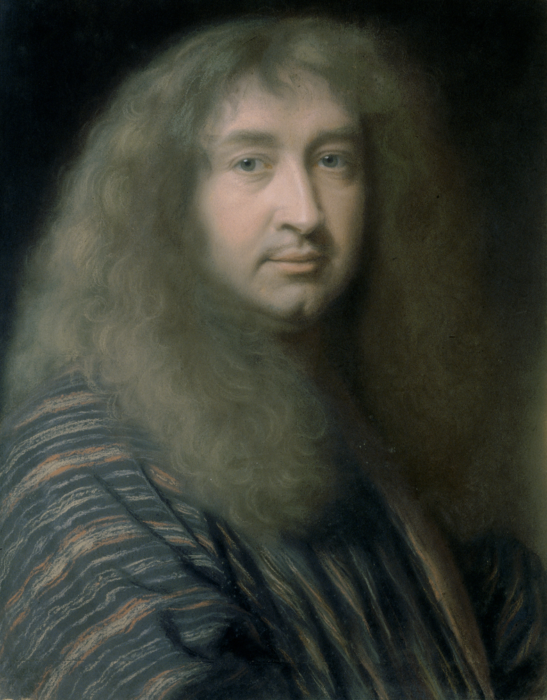 Autoportrait